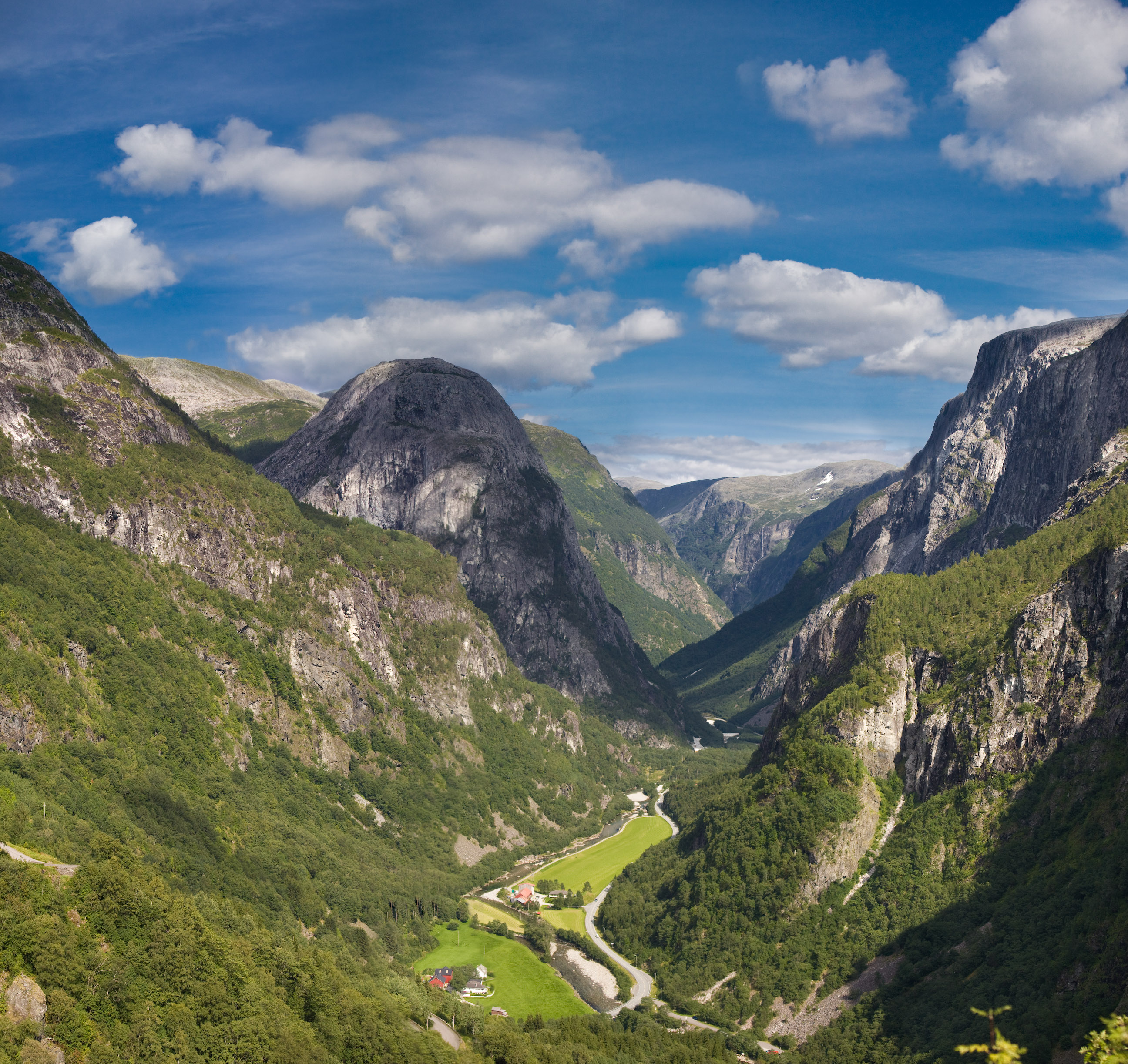 Gudvangen valley seen from Stalheim hotel